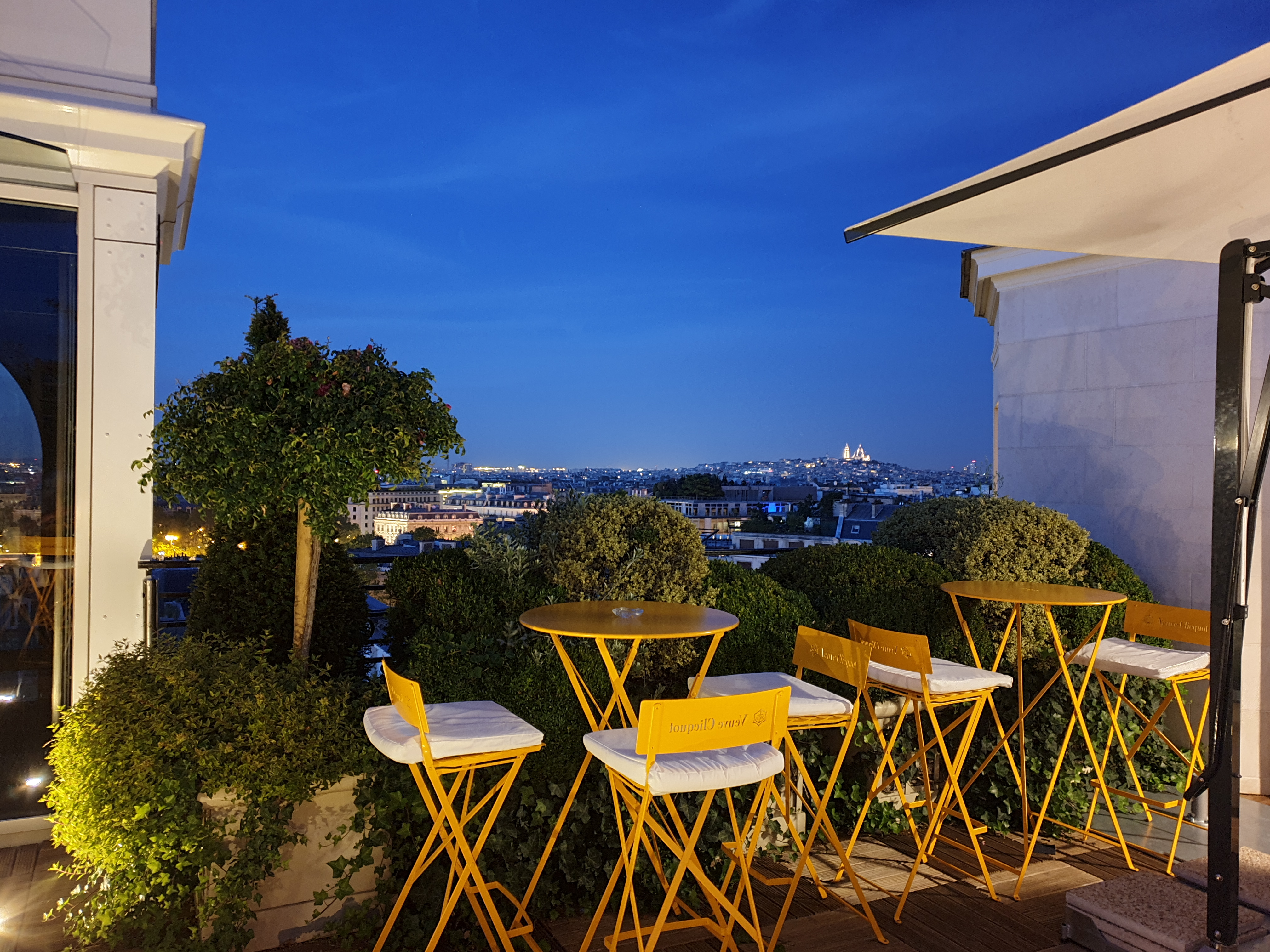 Rooftop at the Hôtel Raphael in Paris